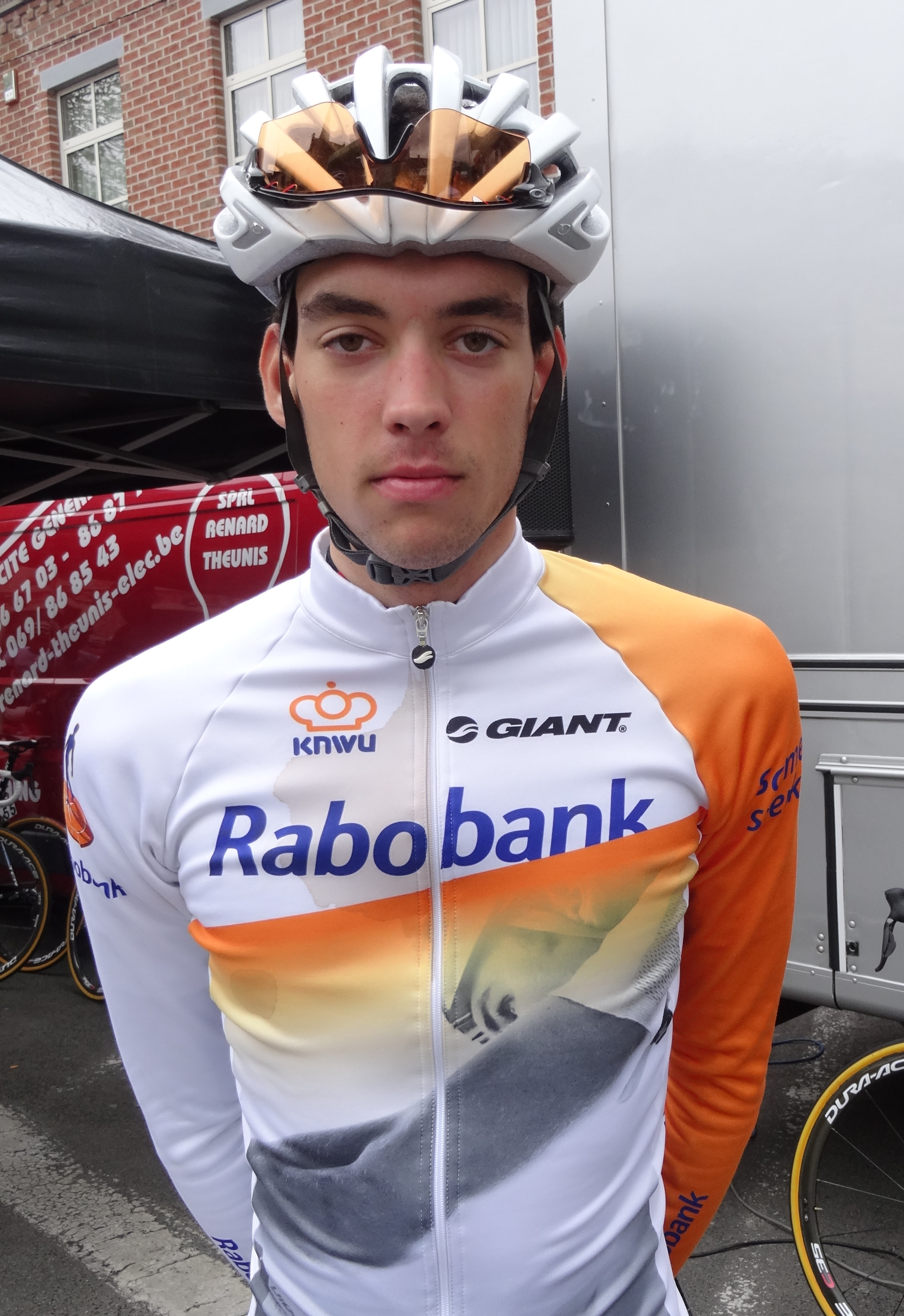 Triptyque des Monts et Châteaux 2014, étape 3, 6 avril 2014, départ de Belœil. Depicted person: Etienne van Empel Depicted team: Rabobank Development The creation of these files was made possible thanks to the organizers of the Triptyque des Monts et Châteaux 2014 English | français | +/−